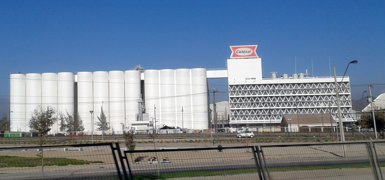 Fábrica Carozzi, San Bernardo, Santiago de Chile.